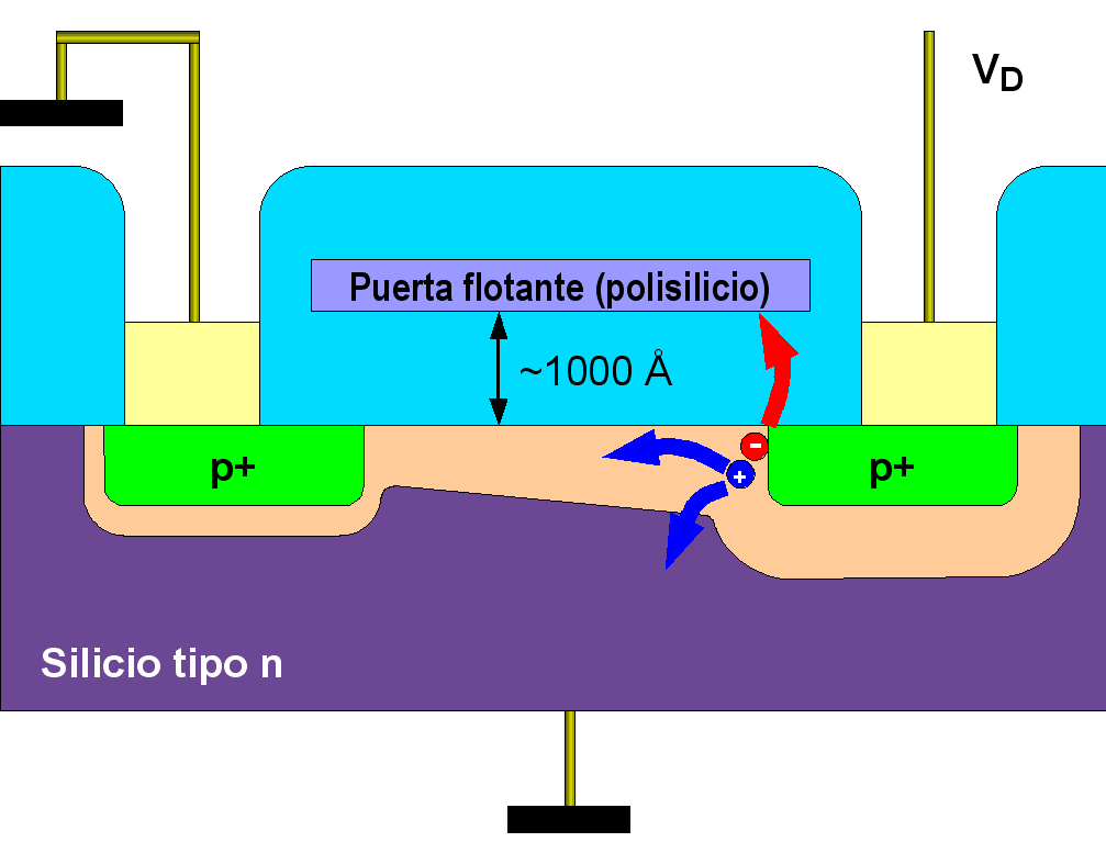 Estructura FAMOS, según Frohman-Bentchkowsky